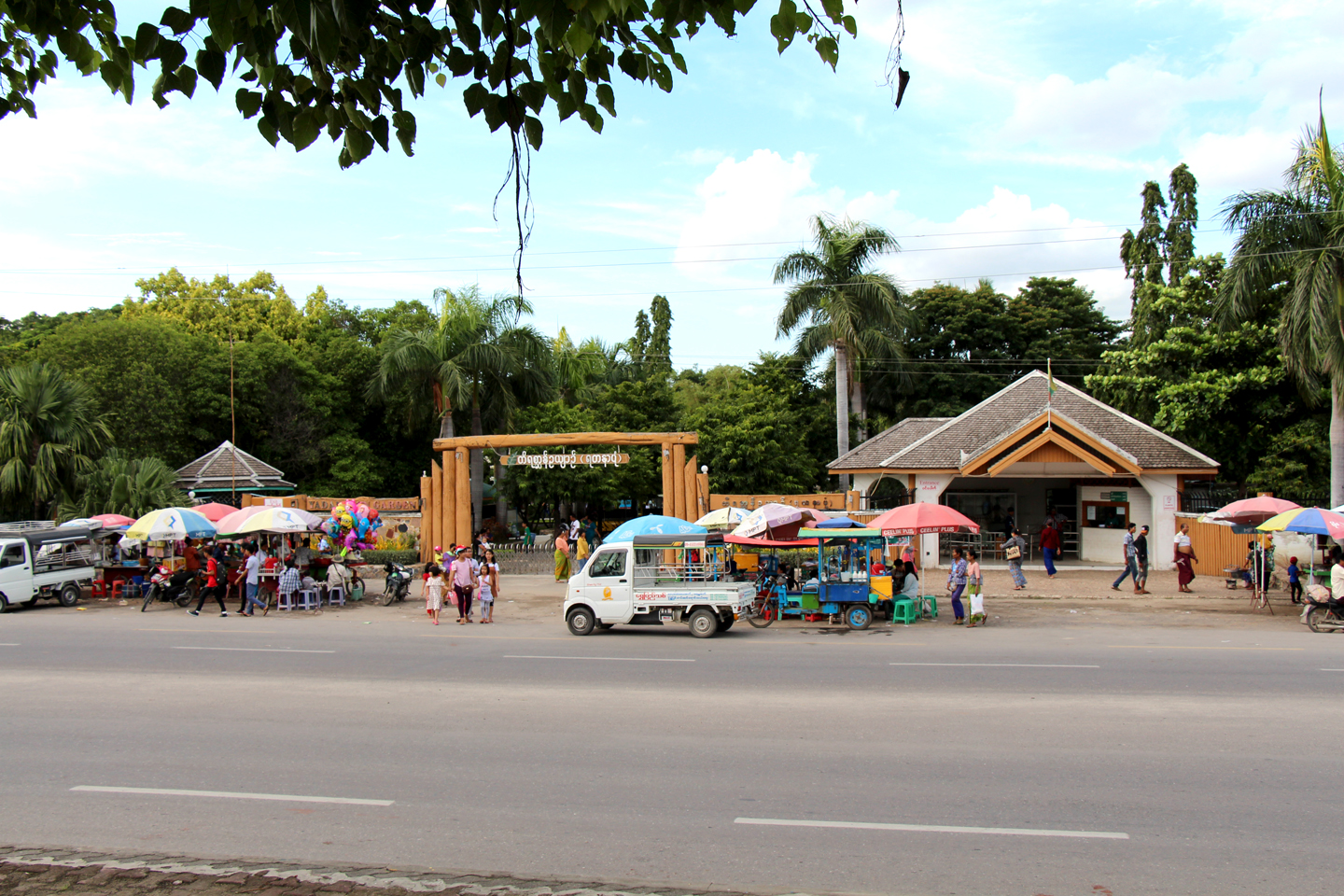 မြန်မာဘာသာ: ရတနာပုံ တိရစ္ဆာန်ဥယျာဉ် (မန္တလေးမြို့)